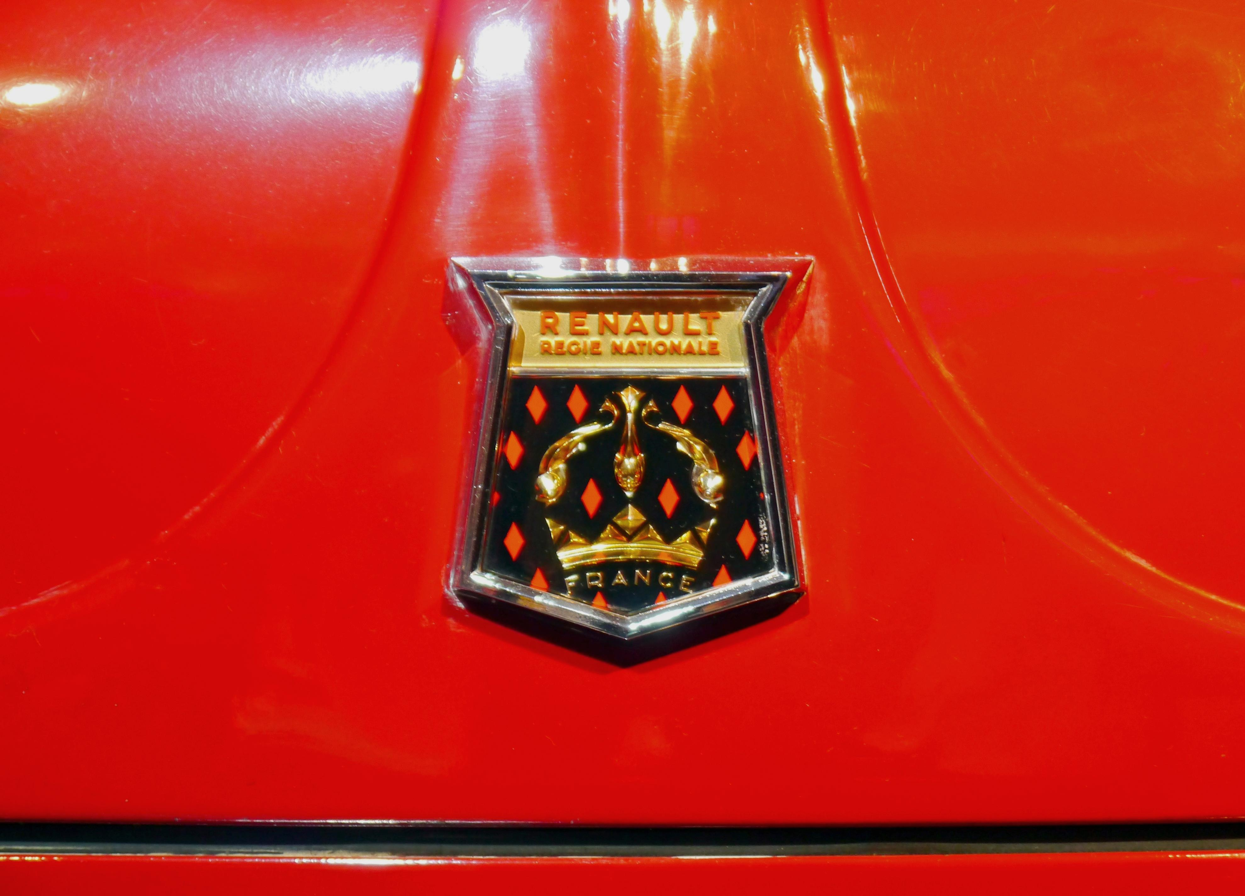 Renault Dauphine Gordini badge.